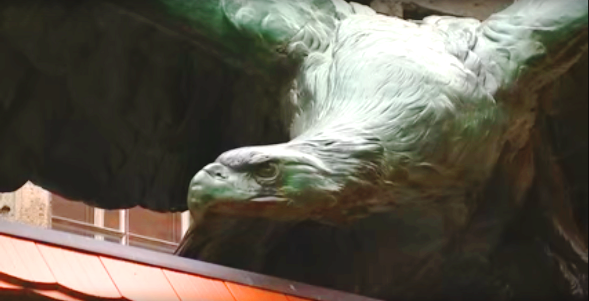 Märkisches Museum (Berlin), Bronzeadler von August Gaul für das Kaiser-Wilhelm-Nationaldenkmal von Reinhold Begas (früher vor dem Berliner Stadtschloss).png